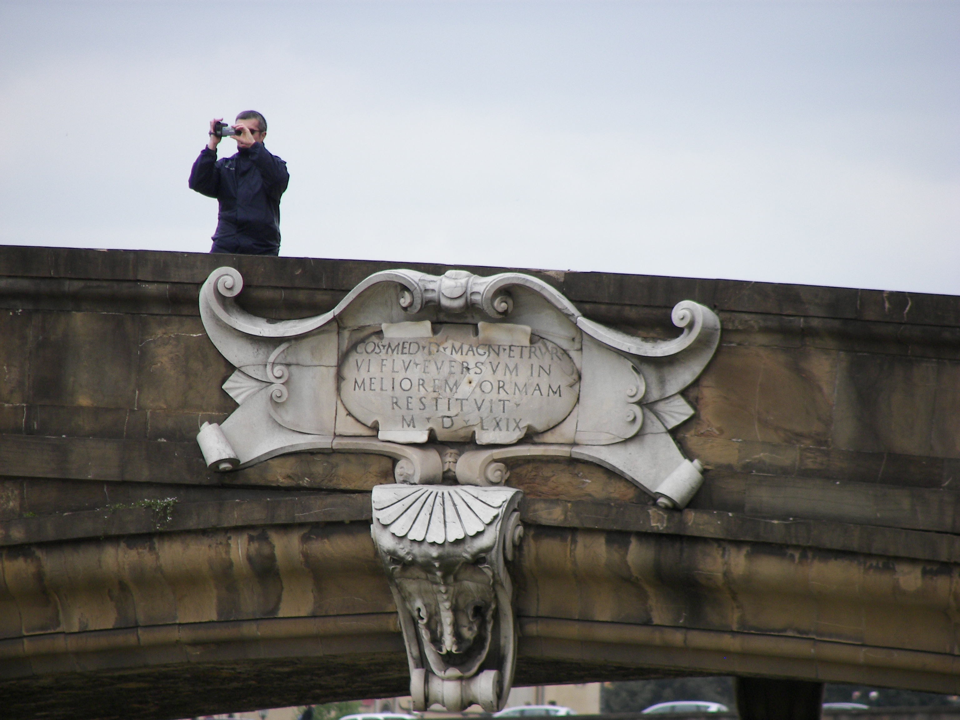 Plaque on the Ponte Santa Trinita in Firenze.